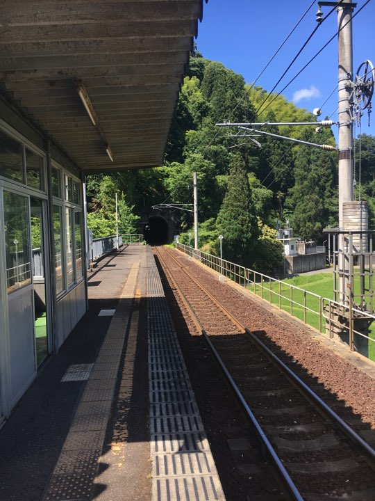 丹鉄下天津駅ホーム 宮津方面